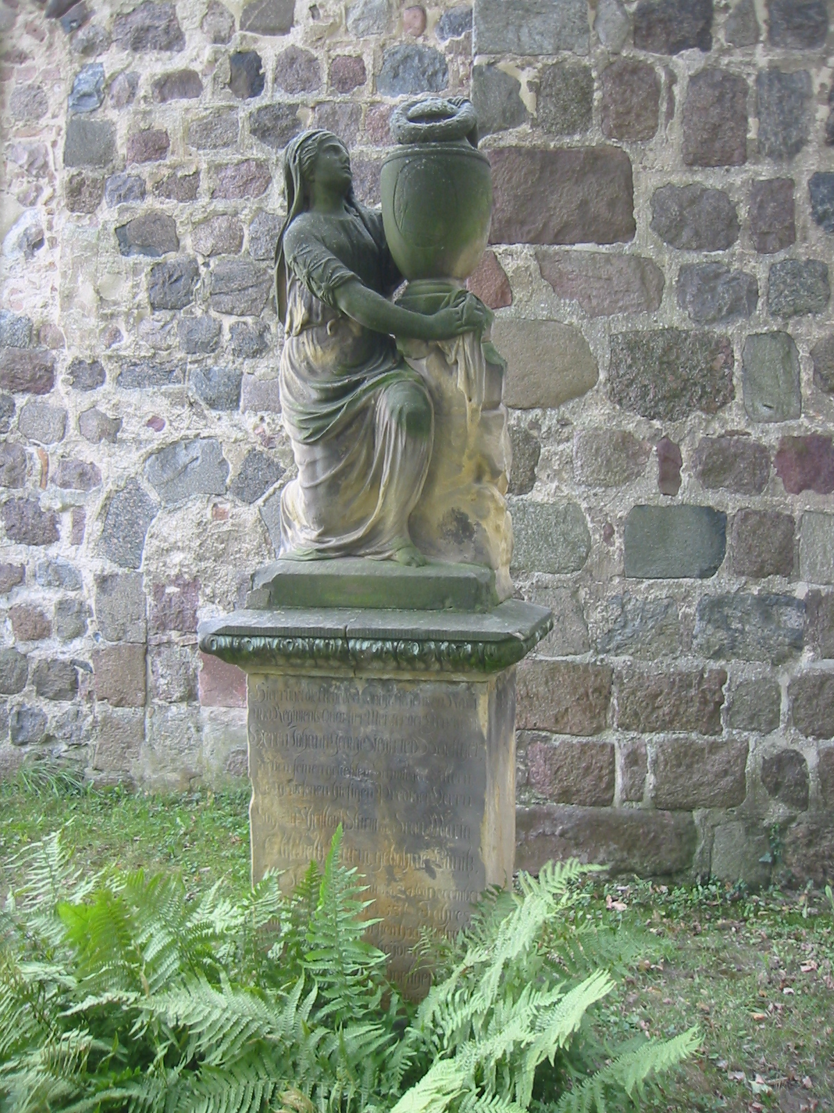 Grabmal von Joh. Siegfried Boettger und seiner Schwiegereltern, dem Pfarrer Joh. Christoph Sturm sowie seiner Frau Maria Elisabeth (geb. Lunte) vor der Dorfkirche in Ruhlsdorf, ein Feldsteinbau aus dem 13. Jahrhundert in Teltow (Stadt), Potsdam-Mittelmark, Brandenburg